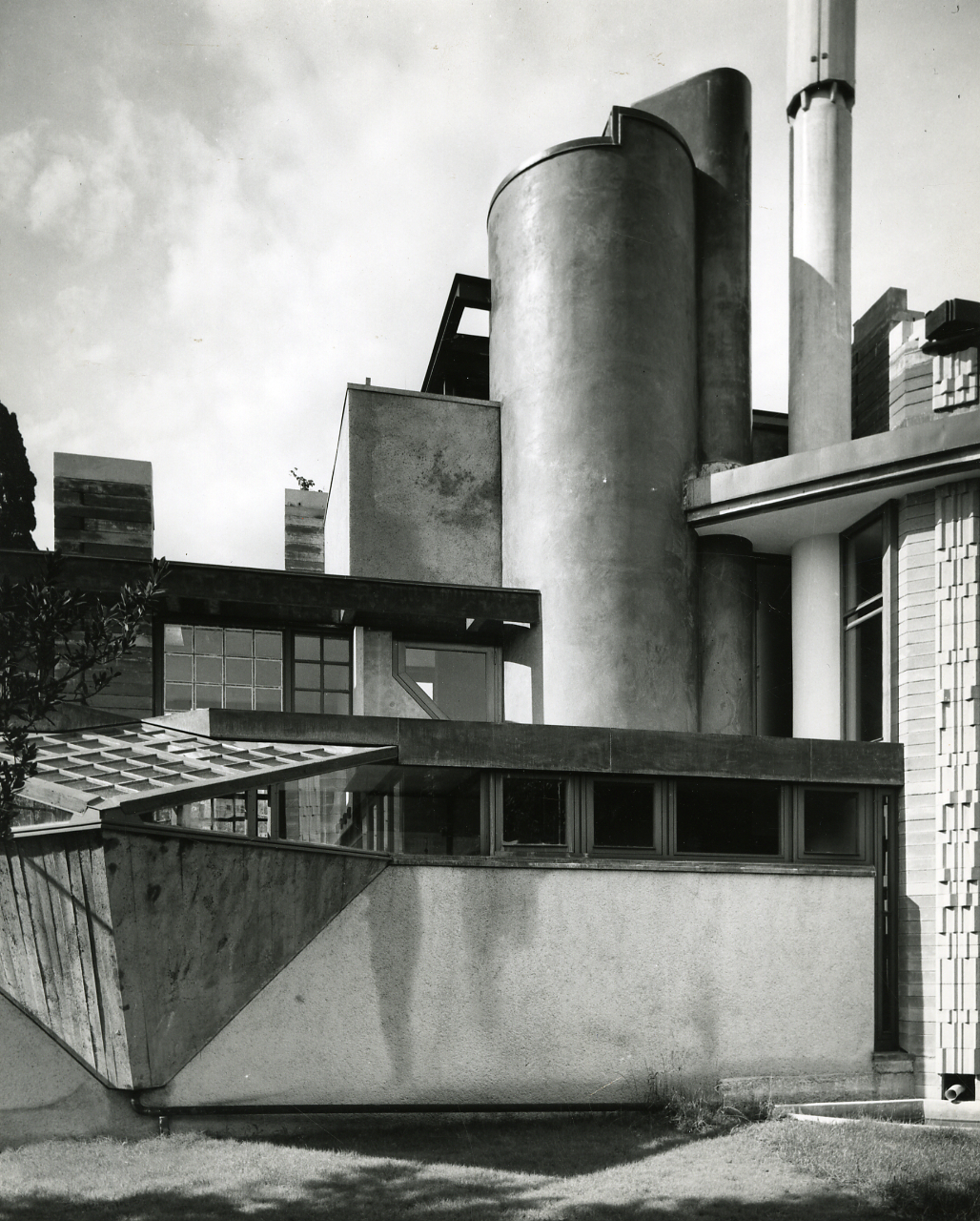 Udine. Villa Veritti realizzata su progetto dell'architetto Carlo Scarpa. Particolari esterni. Servizio fotografico : Udine, 1961 / Paolo Monti, Istituto di fotografia Paolo Monti. - Stampe: 3 : Positivo b/n, gelatina bromuro d'argento/ carta, 18x24, 24x30. - ((Sul coperchio della scatola, manoscritto a pennarello: "Archit. Moderna". Una delle stampe è contrassegnata dal timbro "Istituto di fotografia/ Paolo Monti/ C.so Sempione n. 28/ 20154 Milano"